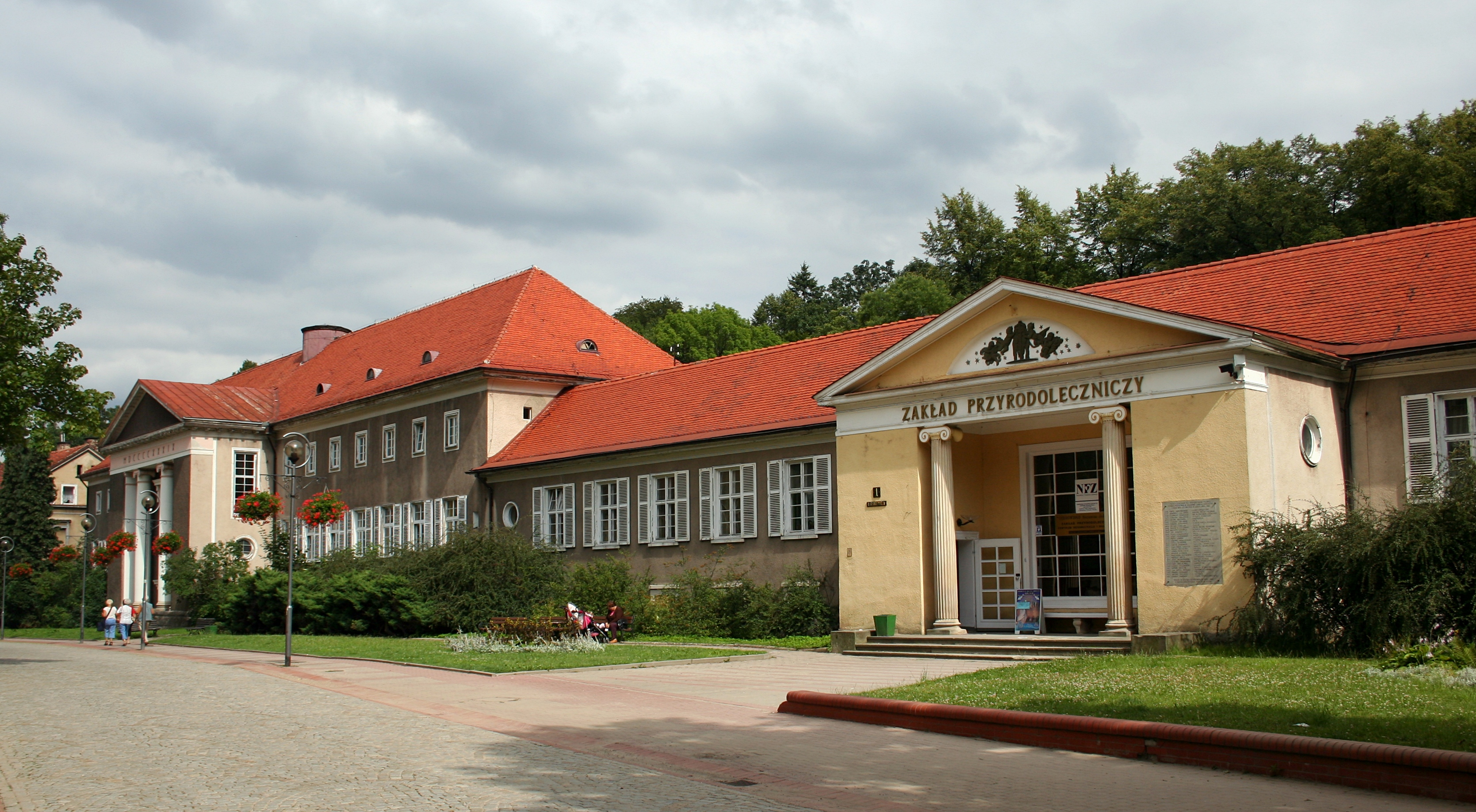 Zakład Przyrodoleczniczy w Szczawnie-Zdroju